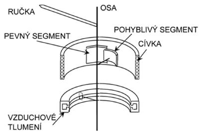 Princip elektromagnetického měřáku